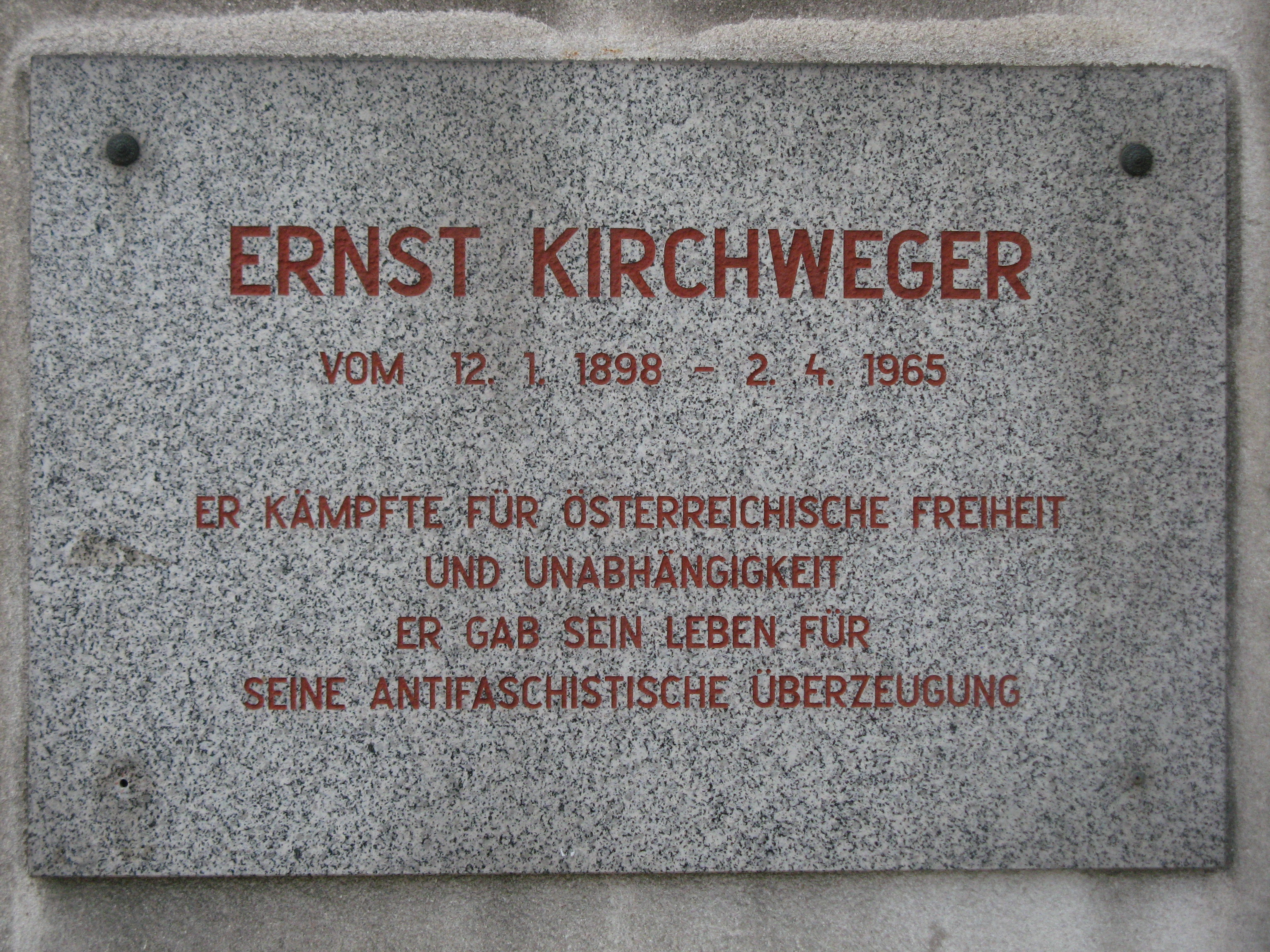 Gedenktafel für Ernst Kirchweger, Ernst-Kirchweger-Hof (1979-81), Sonnwendgasse 24, Wien-Favoriten